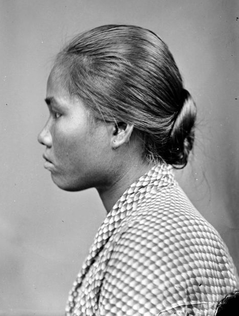 Negatief. Een Alfur vrouw uit Gorontalo, Noord-Celebes